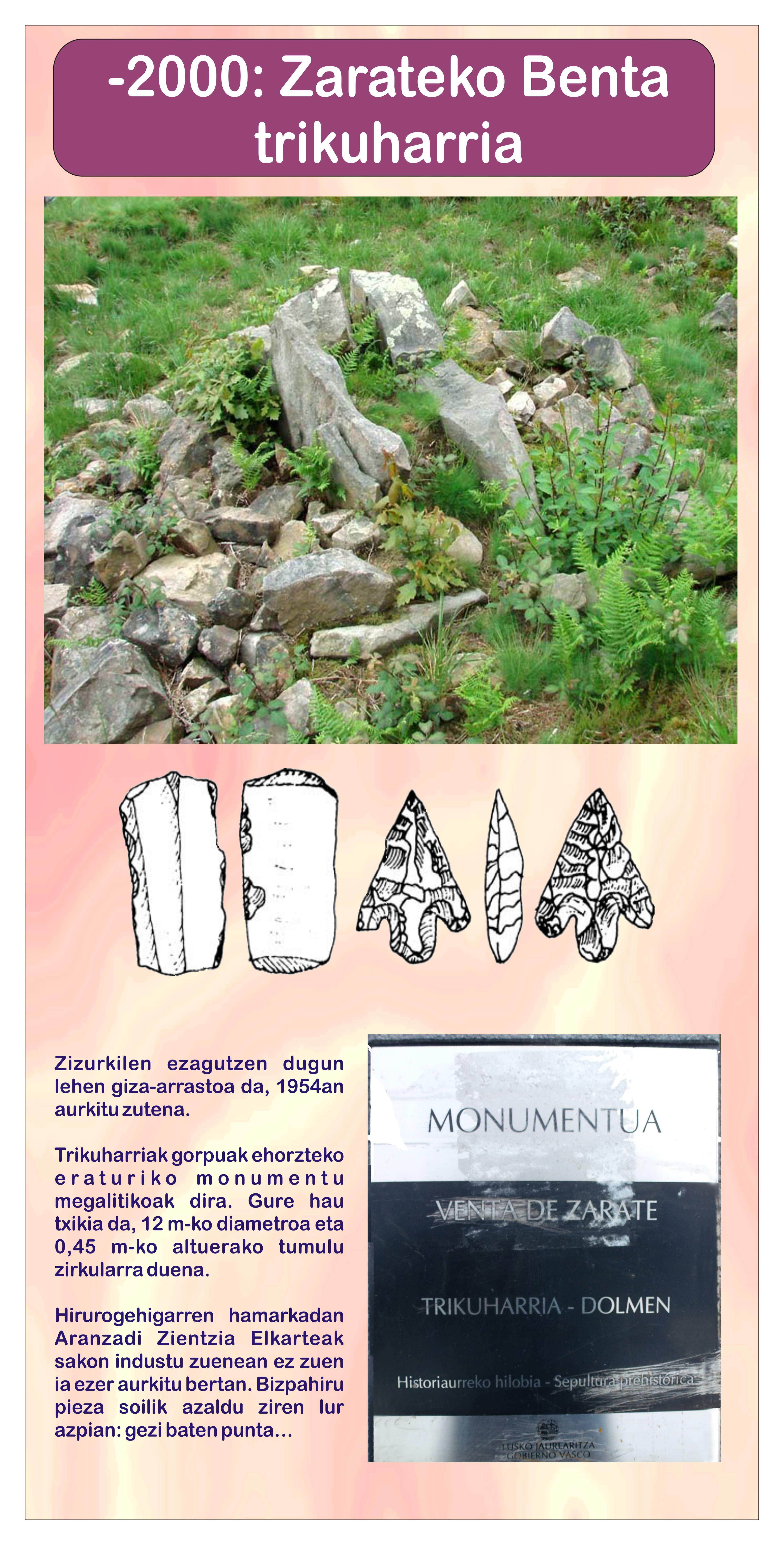 Zarateko benta izeneko trikuharria